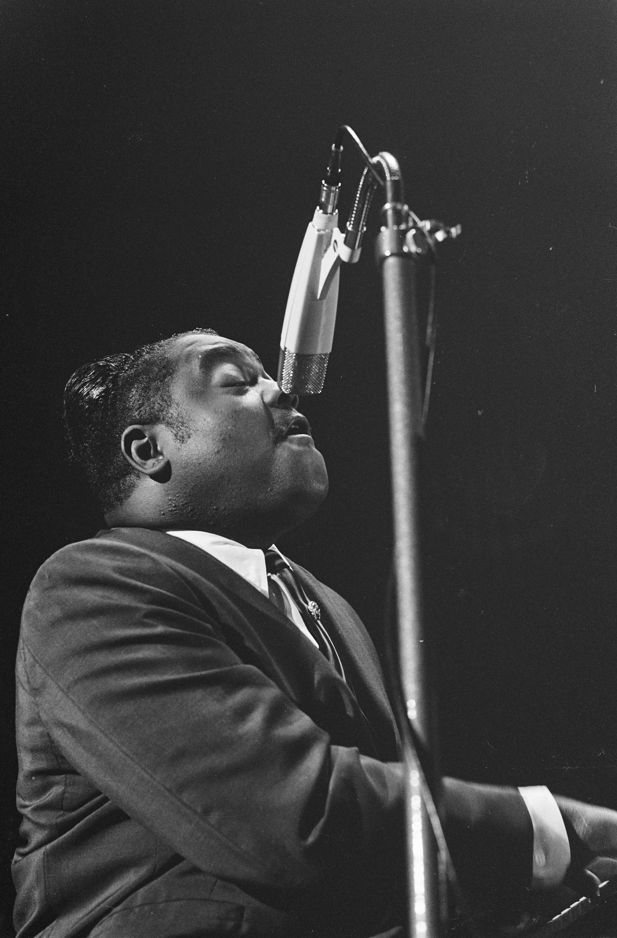 Collectie / Archief : Fotocollectie Anefo Reportage / Serie : [ onbekend ] Beschrijving : Fats Domino in Amsterdam, Fats tijdens zijn optreden in het Concertgebouw Datum : 3 november 1962 Locatie : Amsterdam, Noord-Holland Trefwoorden : CONCERTGEBOUWEN, Optredens Persoonsnaam : Fats Domino Fotograaf : Gelderen, Hugo van / Anefo Auteursrechthebbende : Nationaal Archief Materiaalsoort : Negatief (zwart/wit) Nummer archiefinventaris : bekijk toegang 2.24.01.05 Bestanddeelnummer : 914-4772